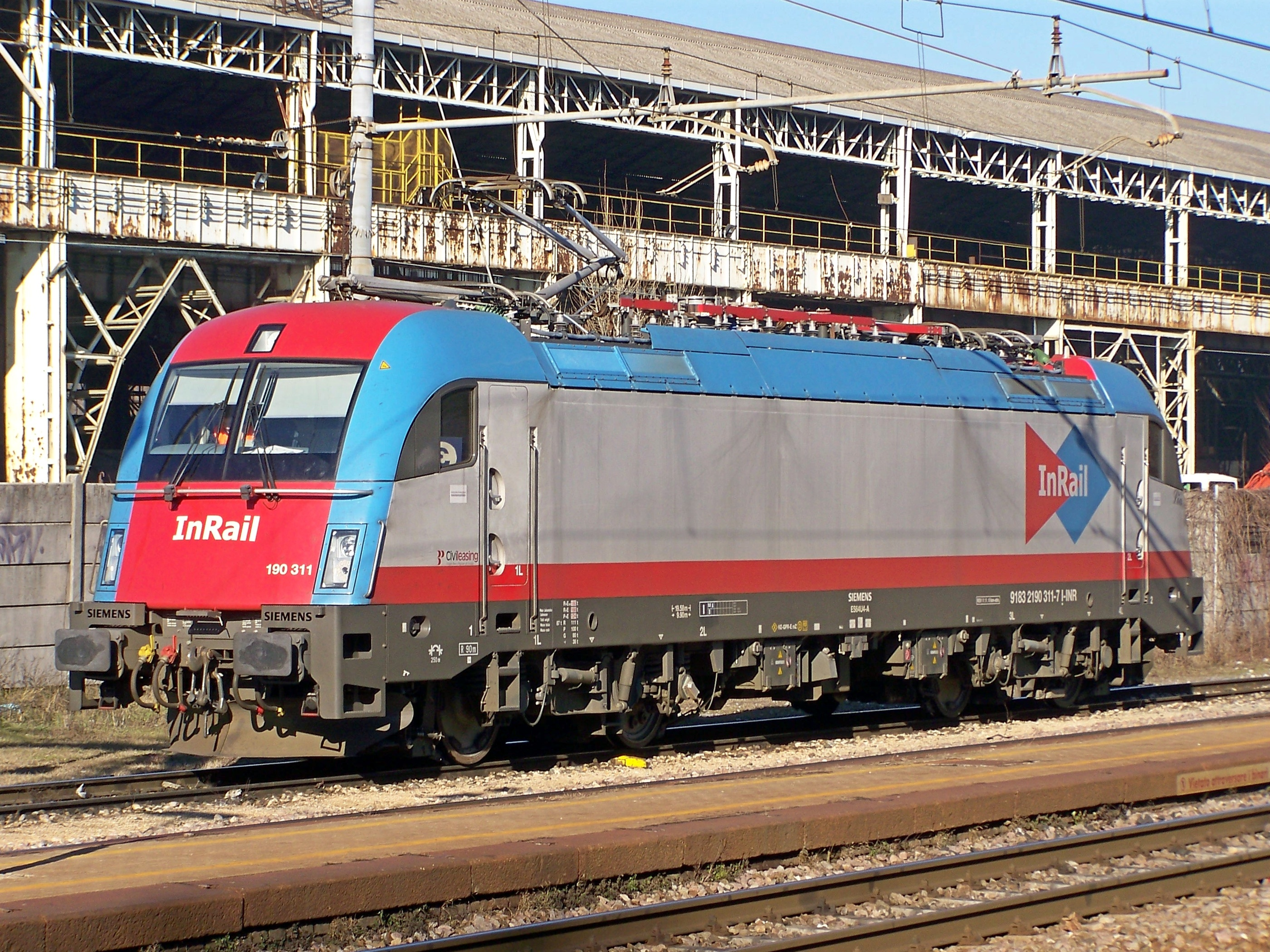 La E.190.311 di InRail manovra sul quarto binario della stazione di San Zeno-Folzano.